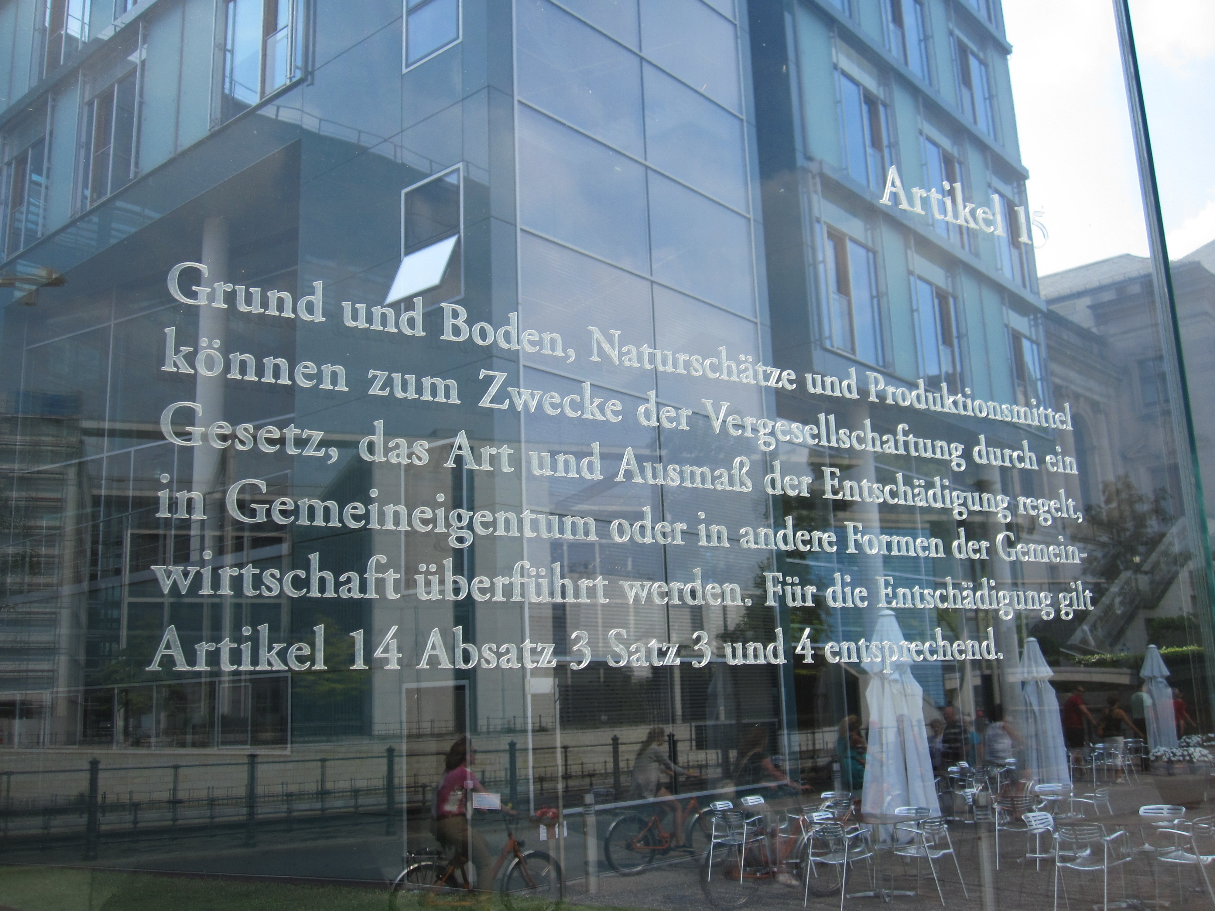 Bundestagsgebäude in Berlin: Der israelische Künstler Dani Karavan hat in drei Meter hohe Glasscheiben, die einen Außenhof des Jakob-Kaiser-Hauses im Uferbereich zur Spree begrenzen, die 19 Grundrechtsartikel des Grundgesetzes mit Laser eingraviert. „Die Grundrechtsartikel schweben gleichsam in Augenhöhe vor dem Haus der Fraktionen, dem Jakob-Kaiser-Haus“ (Andreas Kaernbach, Deutscher Bundestag).